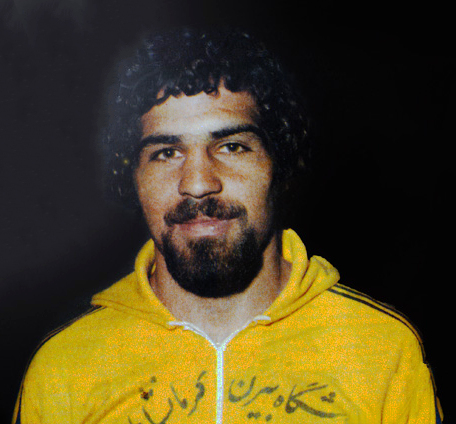 Mohammad Hassan Mohebbi